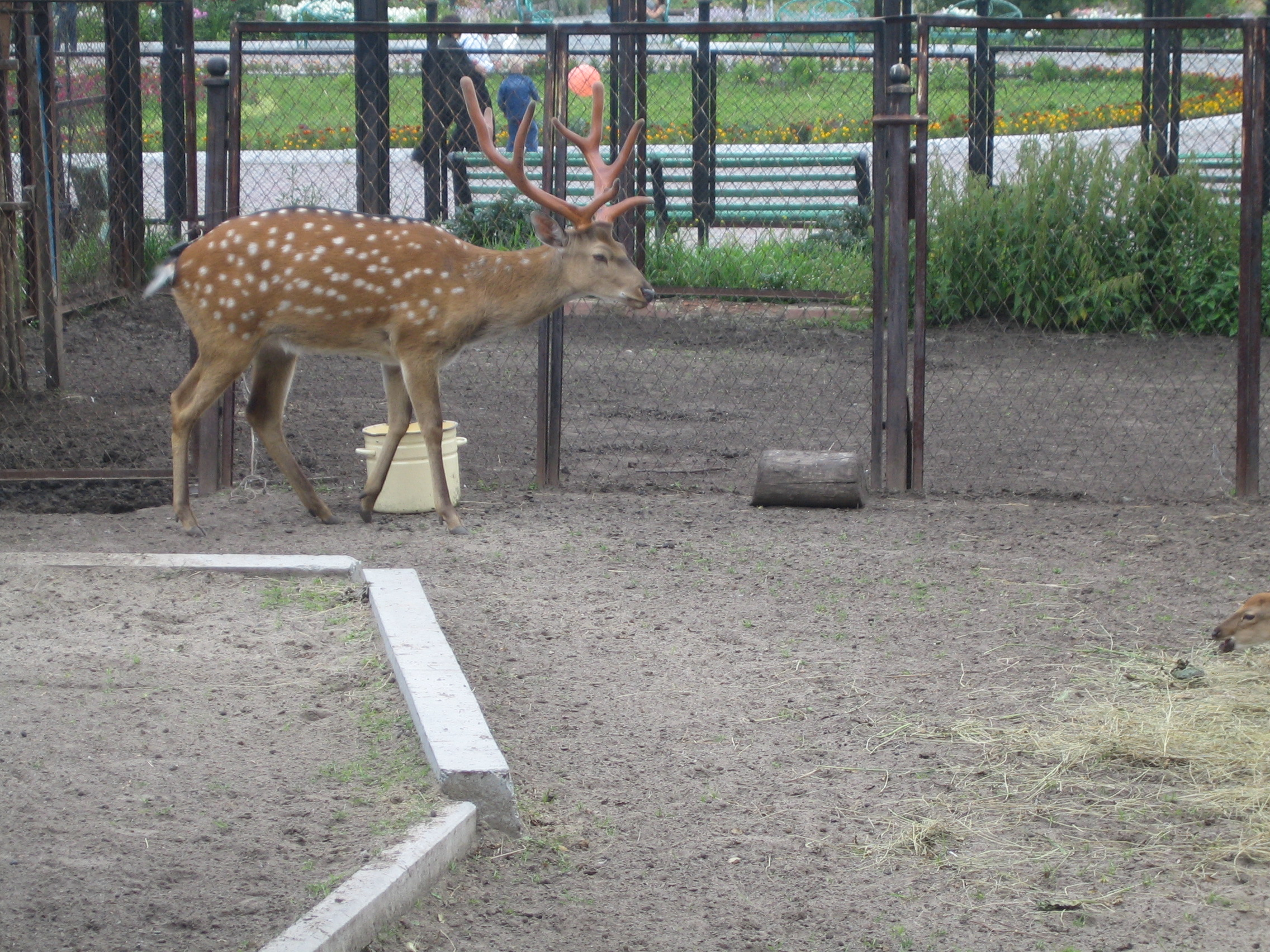 Cerf Sika (cervus nippon), zoo de Cheljabinsk.